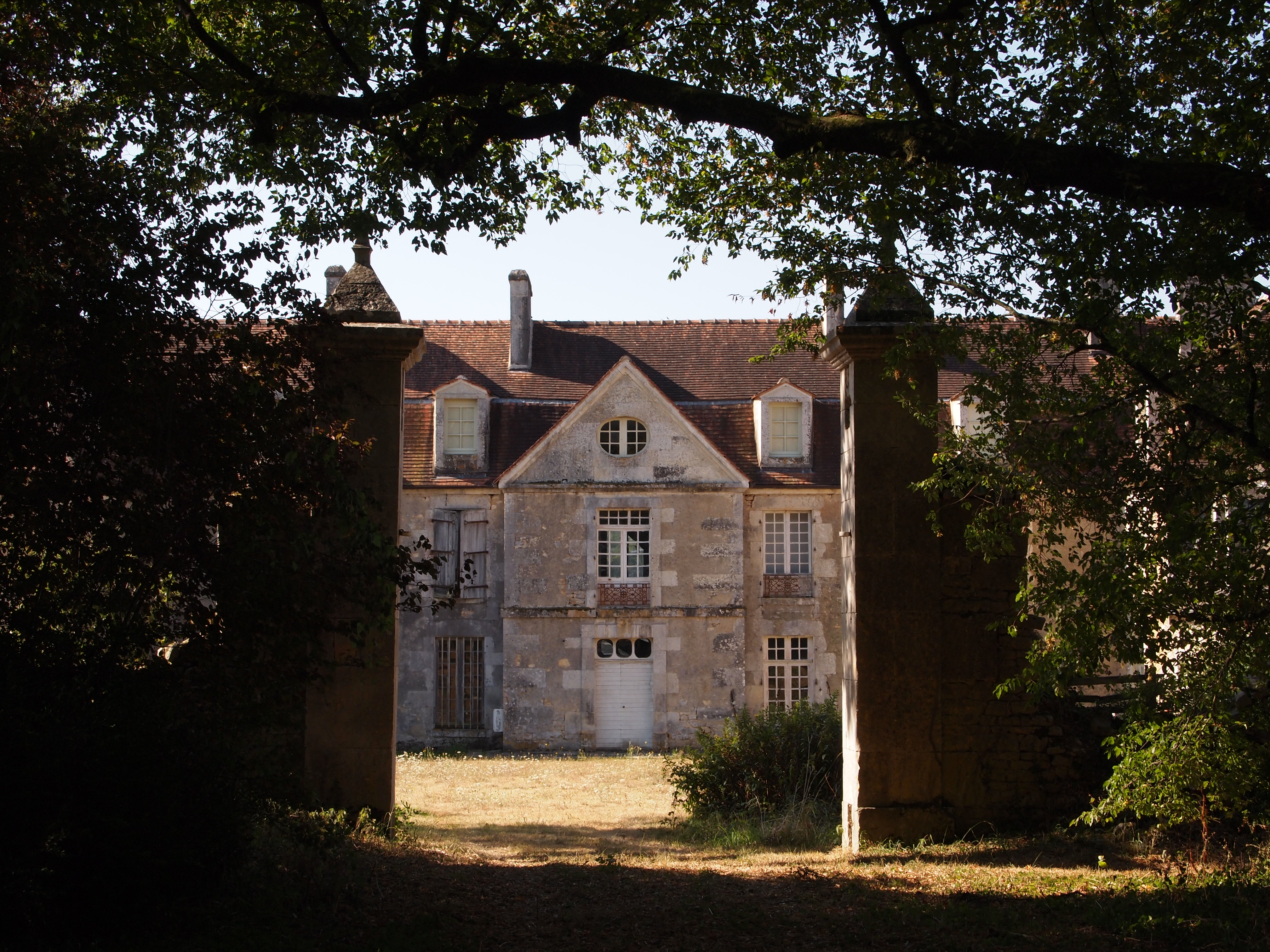 Château de Puybautier, à Saint-Coutant en Charente (inscrit, 2001)